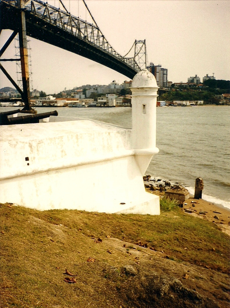 Forte de Santana, Florianópolis, Brasil: detalhe da guarita.